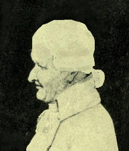 portrait modifié